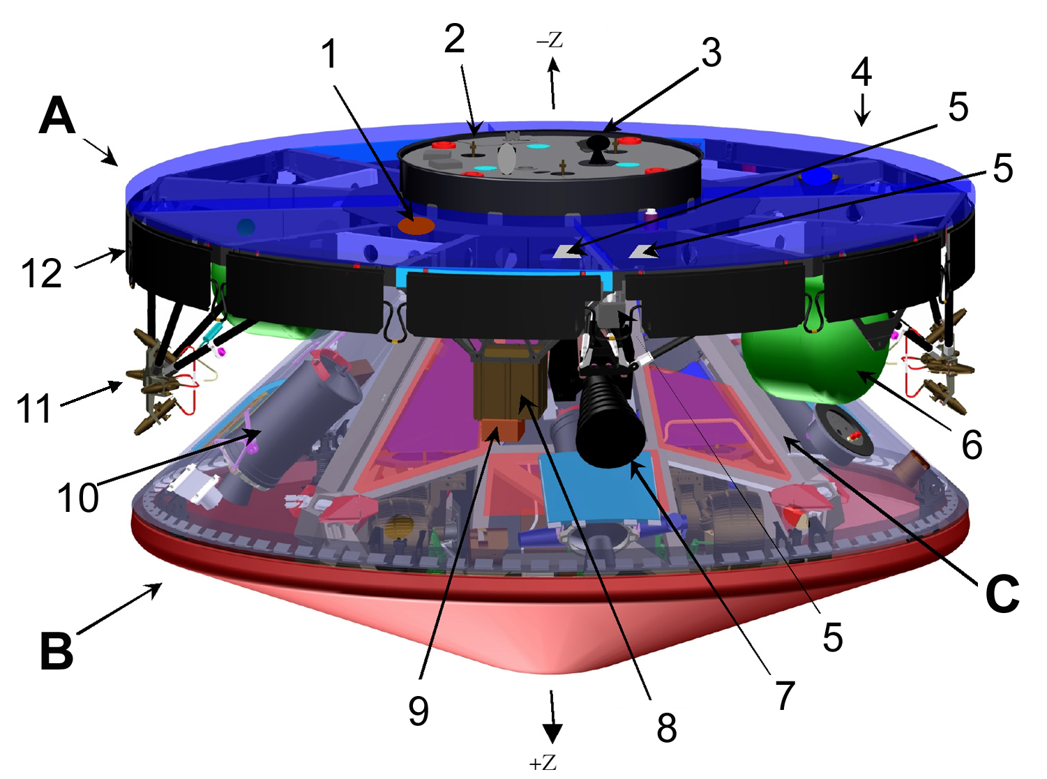 all languages MER cruise stage diagram *